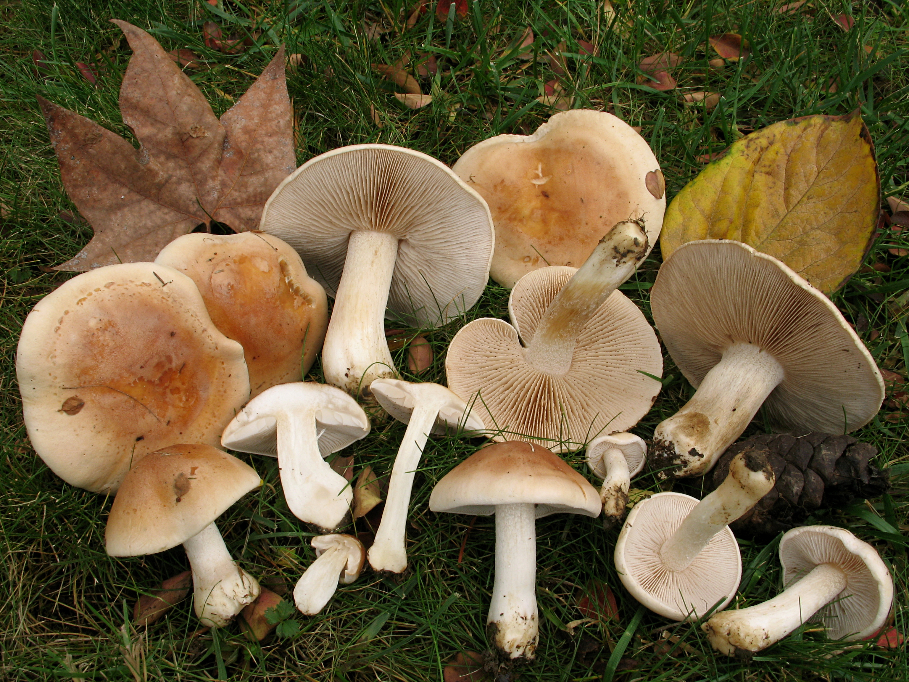 Hebeloma crustuliniforme (Bull.) Quél.